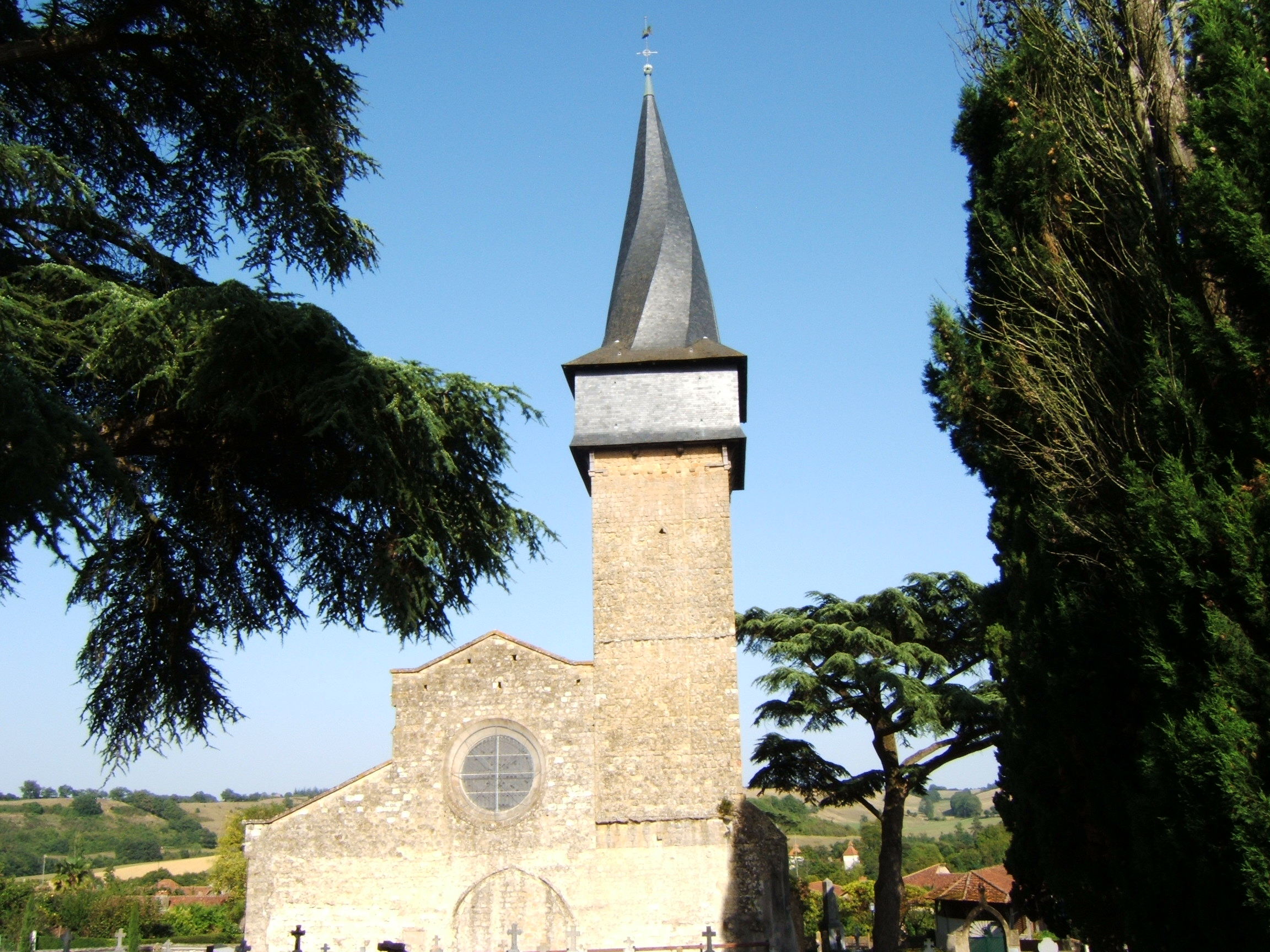 Collégiale Saint Jean-Baptiste de Barran dans le Gers (France)